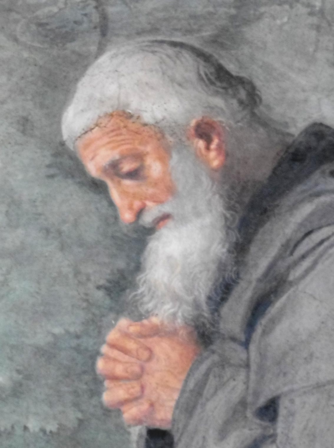 Italia, Lazio, provincia di Roma, Grottaferrata, abbazia territoriale di Santa Maria (abbazia di San Nilo), chiesa abbaziale, cappella dei Santi Nilo e Bartolomeo (fondatori dell'abbazia) o cappella farnesiana, affreschi del Domenichino, particolare della parete sinistra (parete di ingresso): guardando la parete a sinistra della porta di ingresso